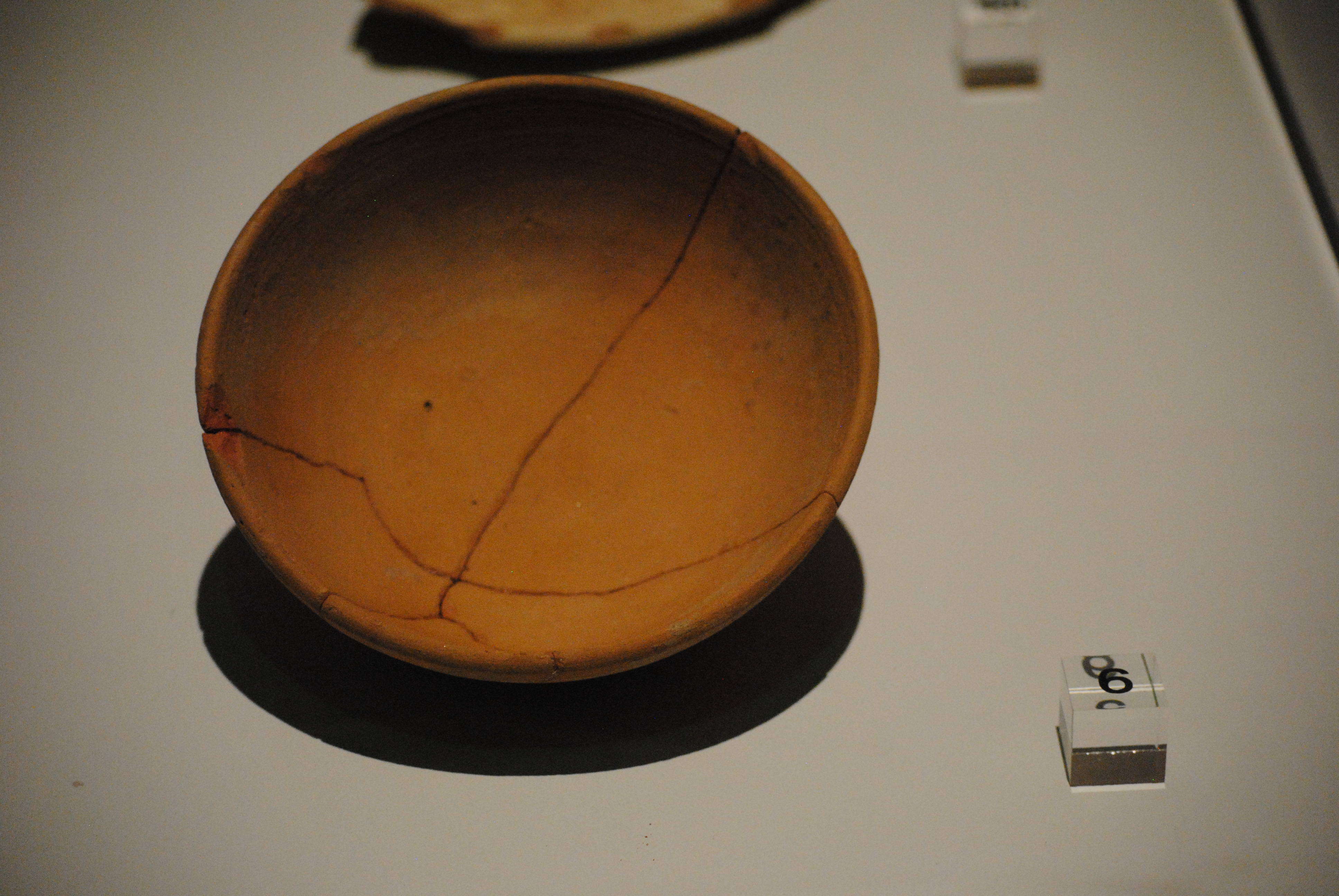 Ciotela in maiolica arcaica prodotto a Pisa (scarto di prima cottura) databile tra il 1530 - 1560 (recuperato durante gli scavi di villa Quercioli, Pisa) - Museo nazionale di San Matteo.